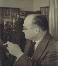 Fotografia de 1953, propriedade do autor